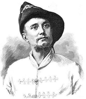 F. 1855. D. 1891 Underlöjtnant. Anställd i Kongo-associationens tjänst 1883-86. Södermanlands regemente. digital source